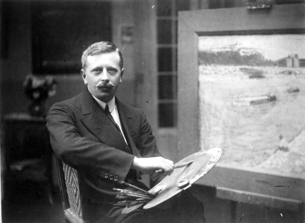 Thomas William Marshall [1875-1914]